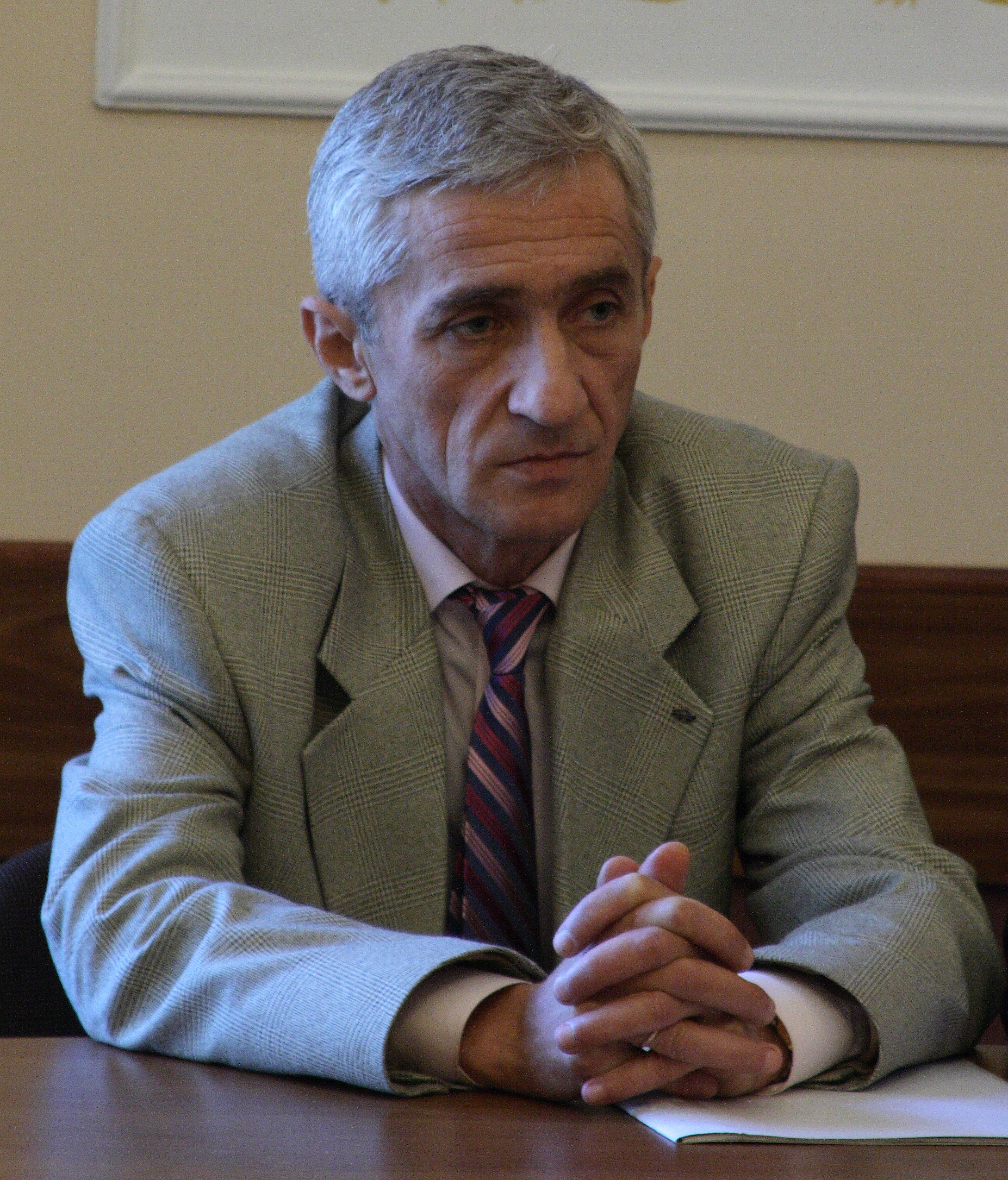 Игорь Гулык, украинский журналист, главред "Суботней почты", до того - "Львовской газеты"